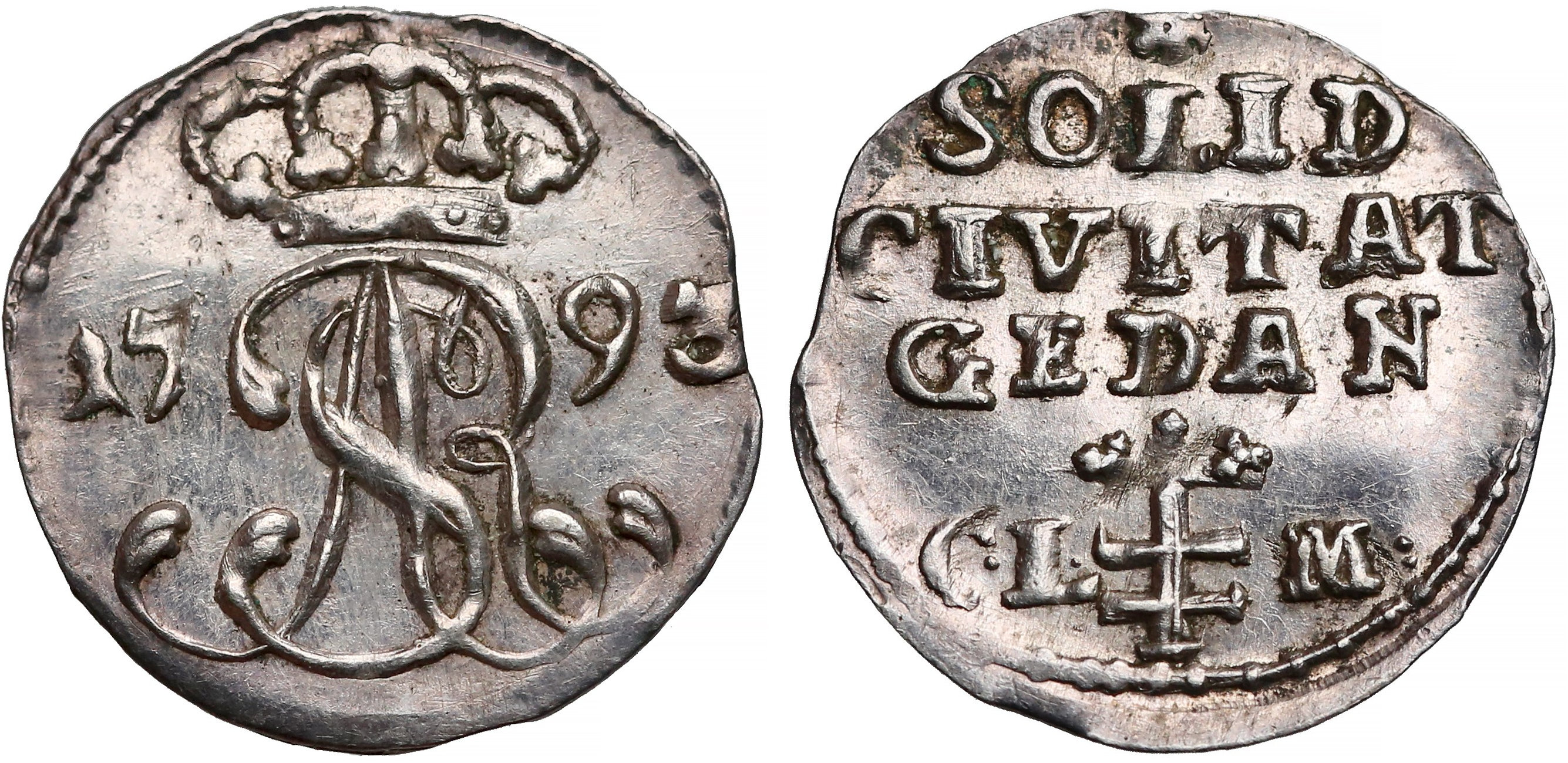 Szeląg miejski Gdańsk 1793